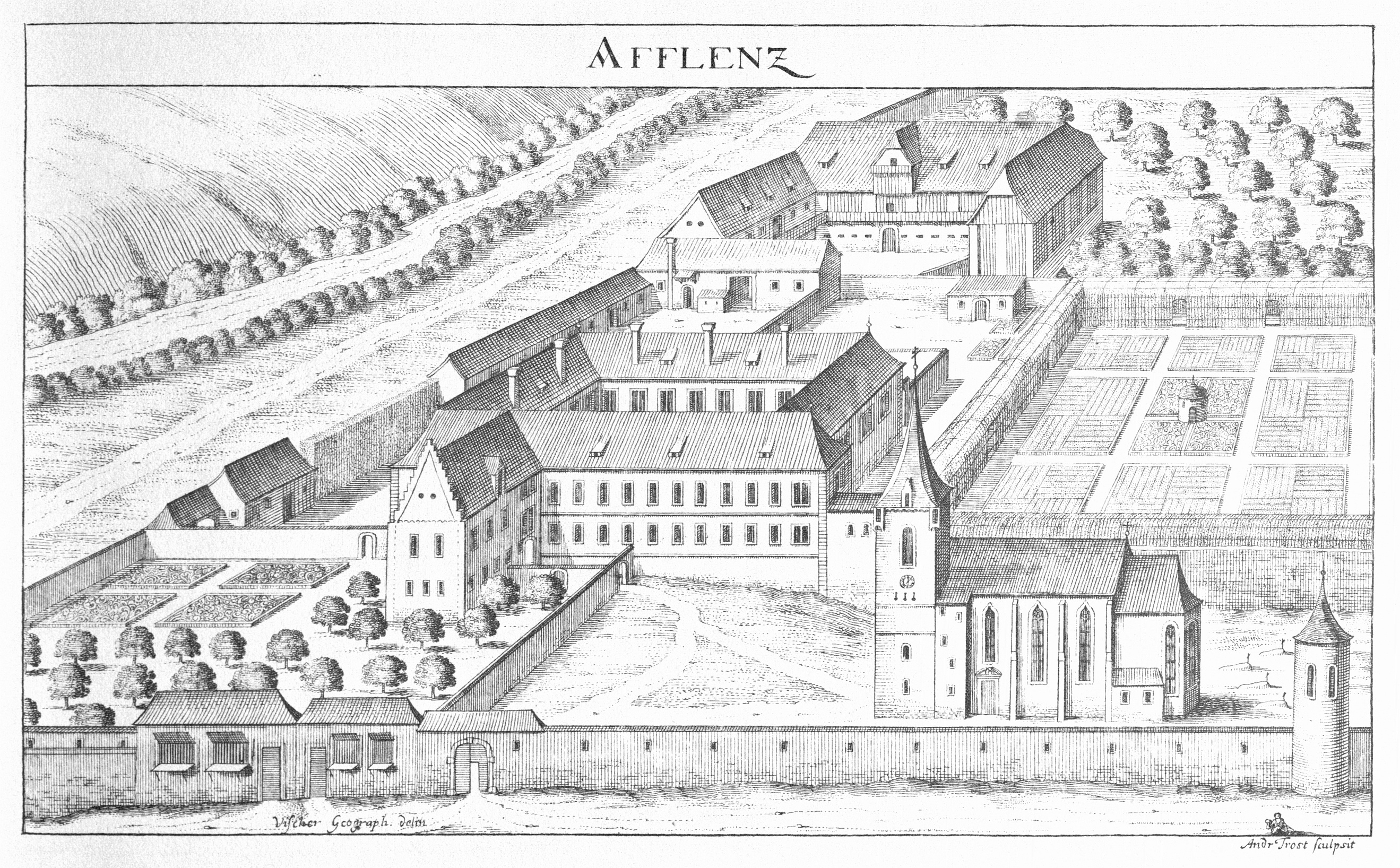 G. M. Vischers Käyserlichen Geographi, Topographia Ducatus Stiriae, Das ist: Eigentliche Delineation / und Abbildung aller Städte / Schlösser / Marcktfleck / Lustgärten / Probsteyen / Stiffter / Clöster und Kirchen / so es sich im Herzogthumb Steyrmarck befinden; Und anjetzo Umb einen billichen Preyß zu finden seynd Bey Johann Bitsch Universitäts Buchhandlern / Auff dem Juden=Platz bey der guldenen Saulen. Graz 1681 (More images, commons, de) (More images, commons, de)